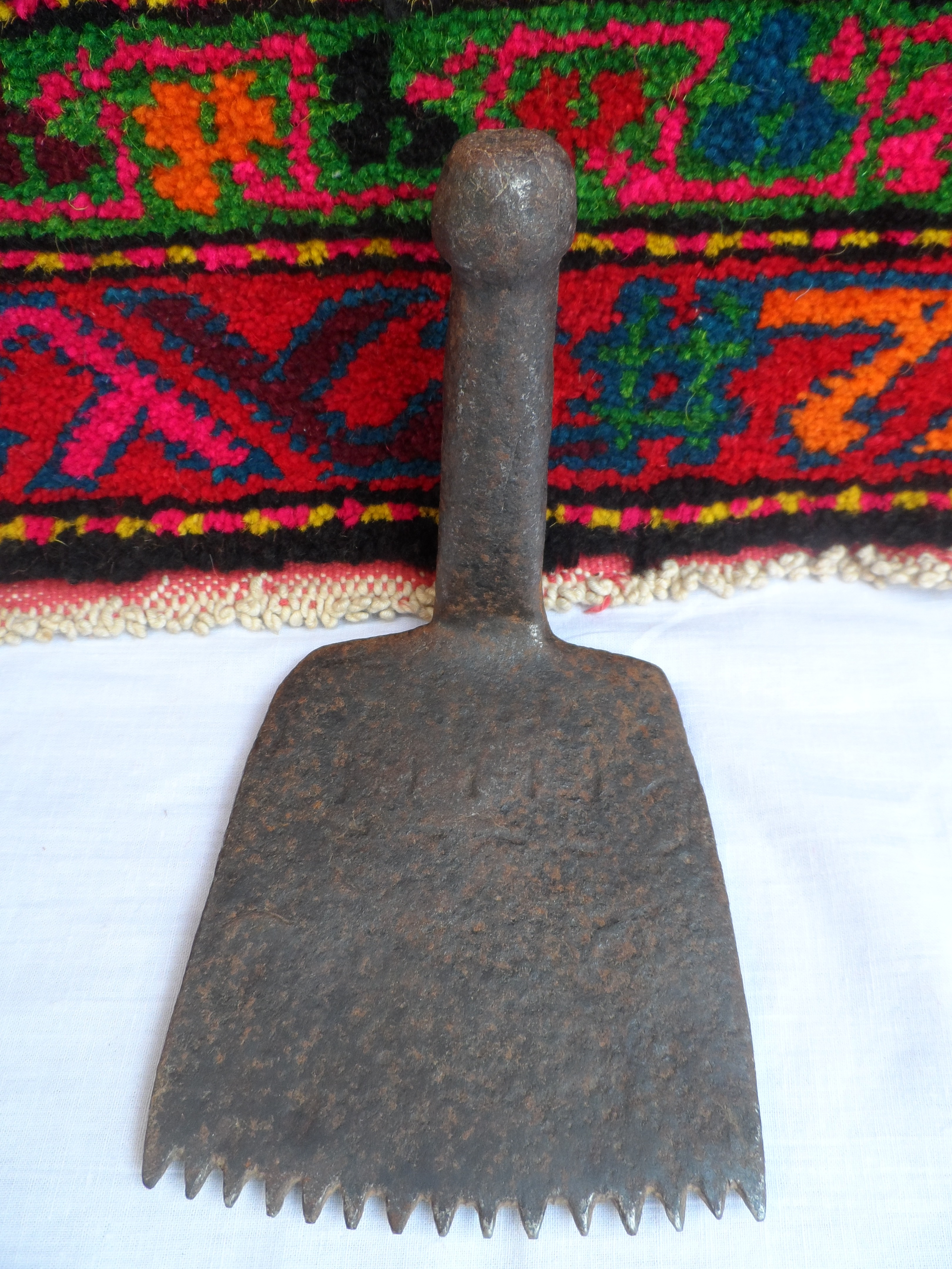 Həvə — xalça, palaz və digər xalça məmulatlarını toxuyarkən ilmələri döyüb yerində bərkitmək üçün (bəzi heyvanların buynuzundan, yaxud da metaldan və s.-dən hazırlanan) ucu kəsik, dişli alətdir. Azərbaycanın bəzi bölgələrində bu aləti toxmaq da adlandırırlar.